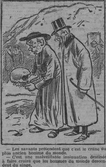 Caricature pastichant la découverte d'un homme de Néandertal par l'abbé Jean Bouyssonie